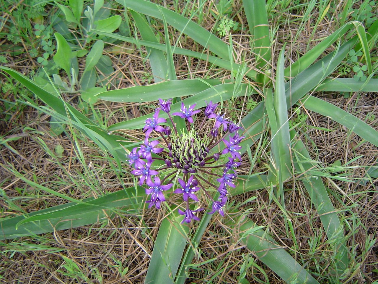 Scilla peruviana L. Costa de Cádiz, España.